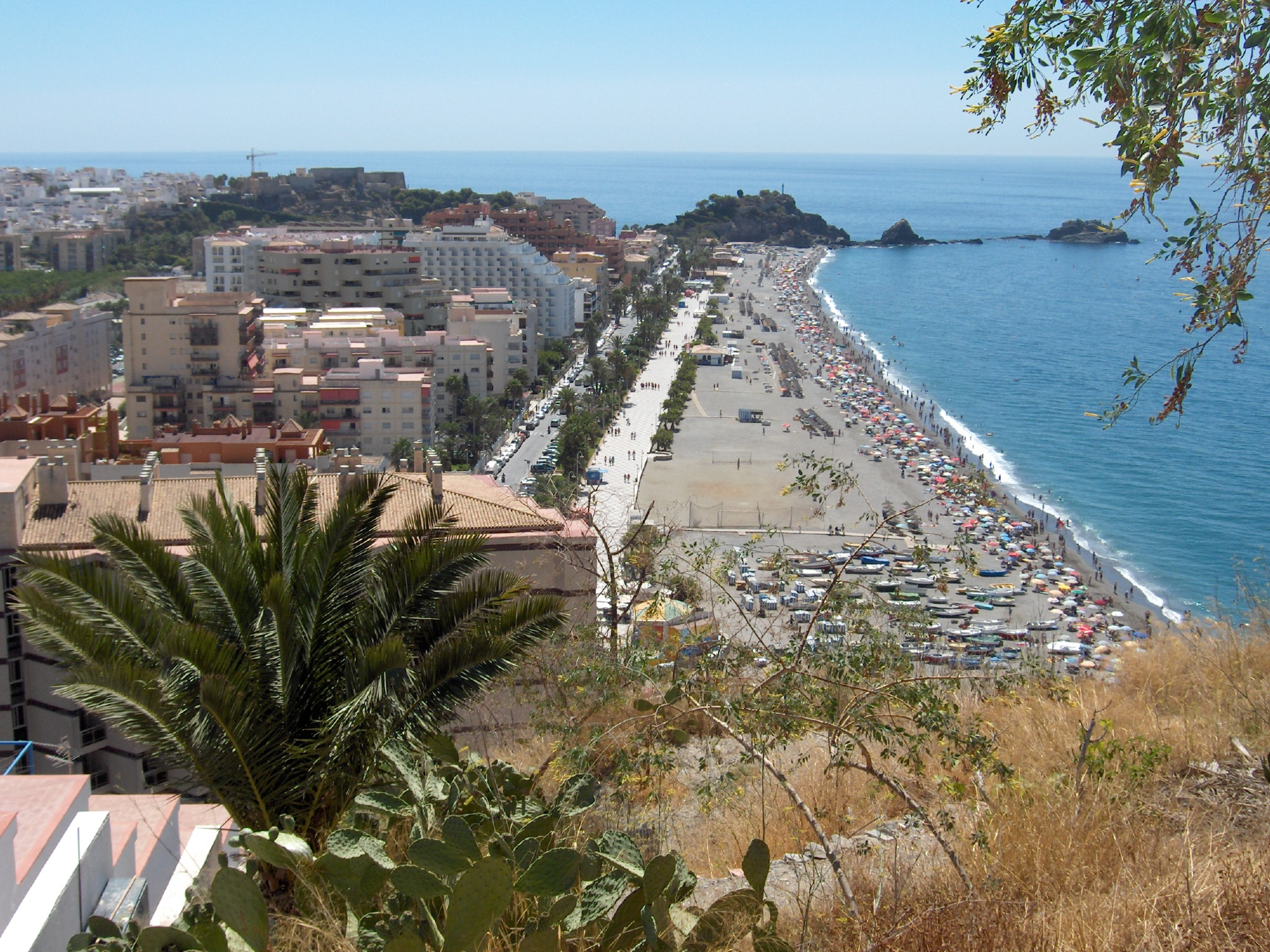 Vista de la playa de San Cristóbal , Almuñécar, desde el barrio de Los Marinos.